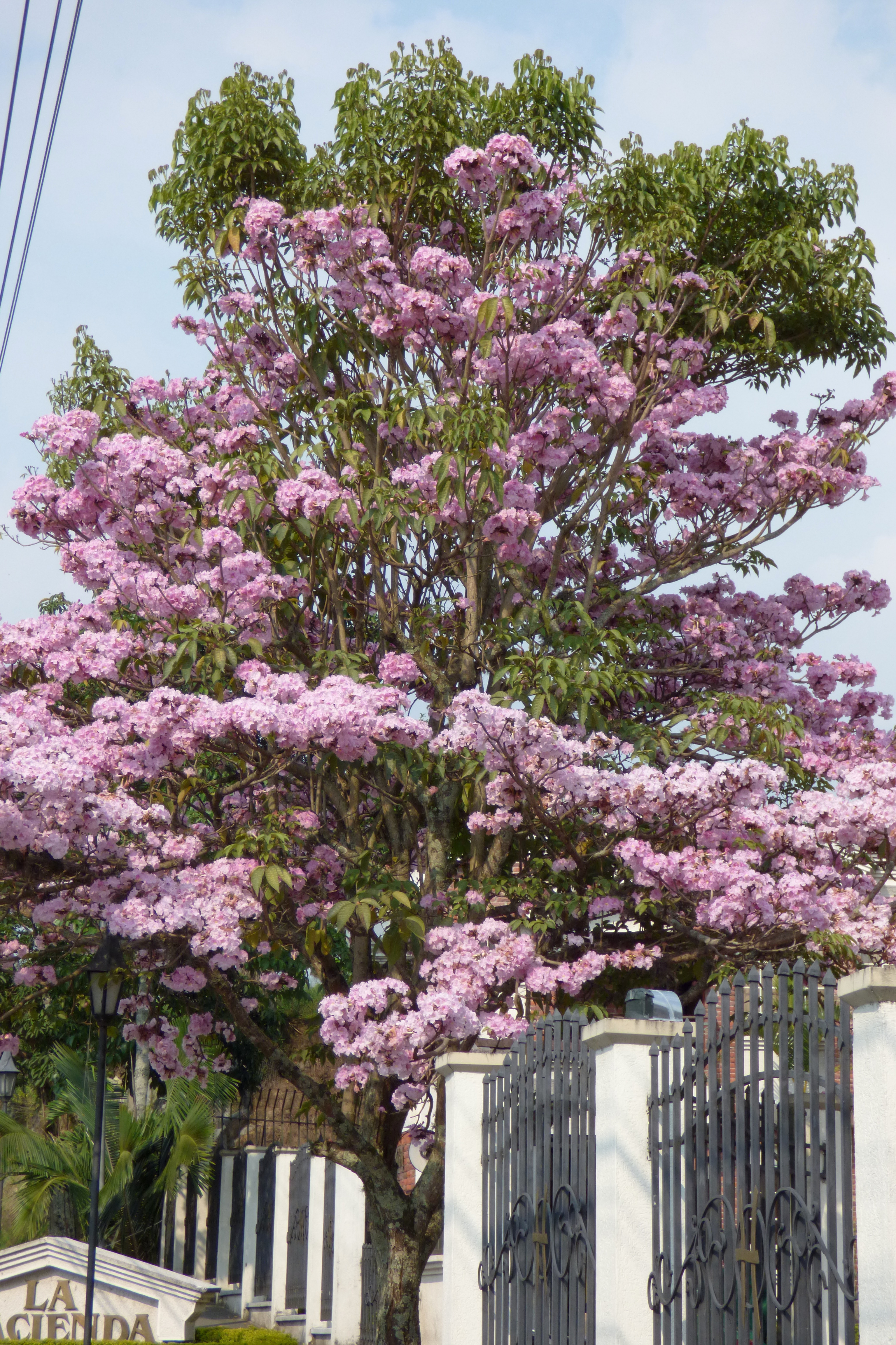 Guayacán rosado (Tabebuya rosea)